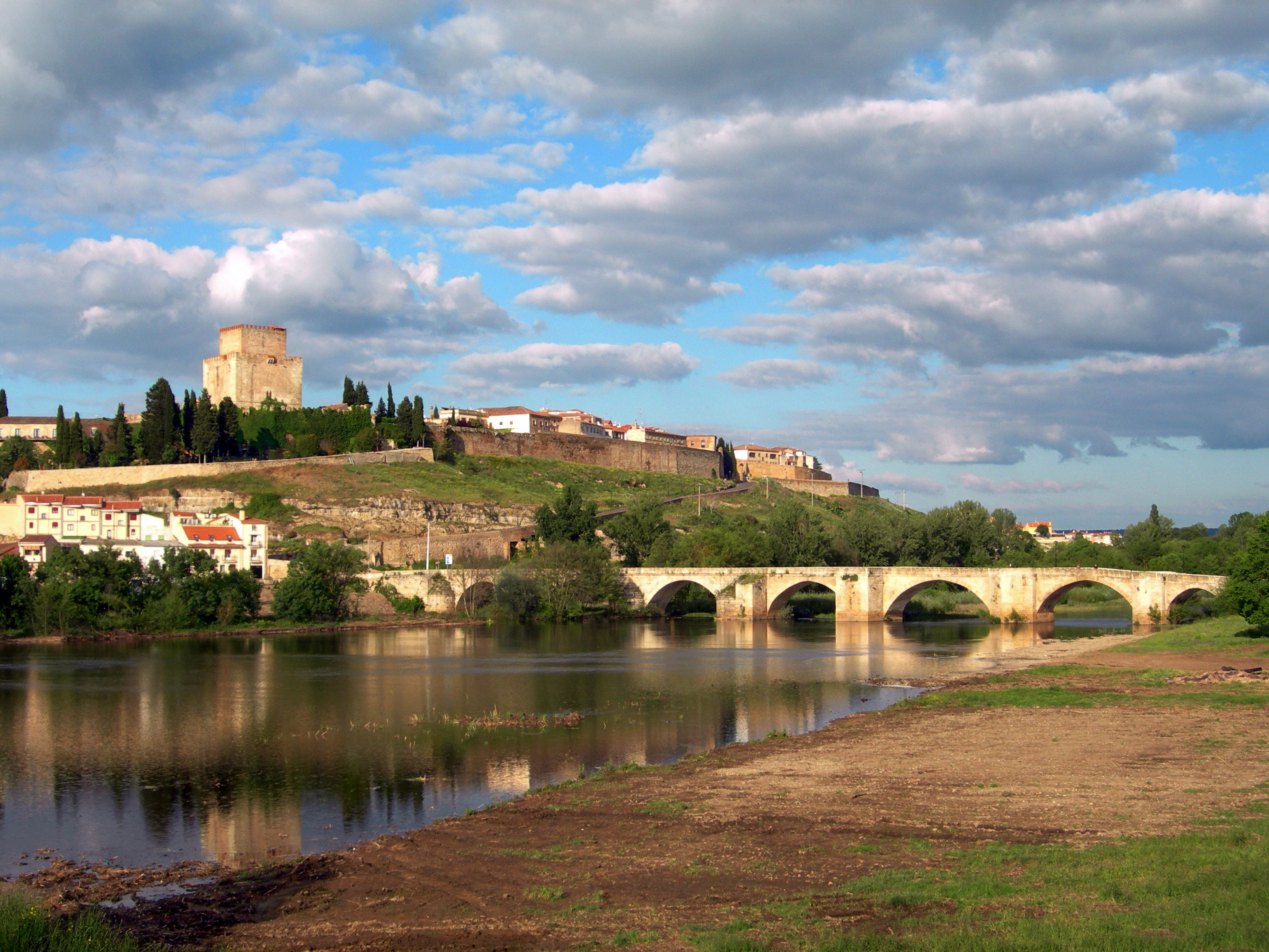 Vista de Ciudad Rodrigo